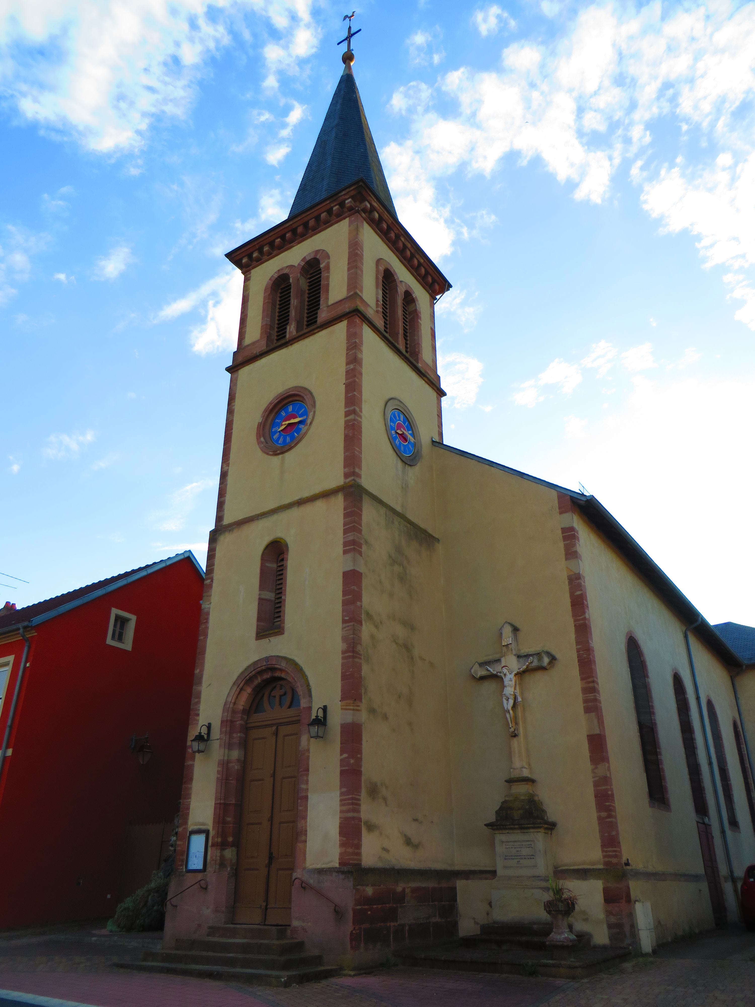 Remelfing Église Saint-Pierre